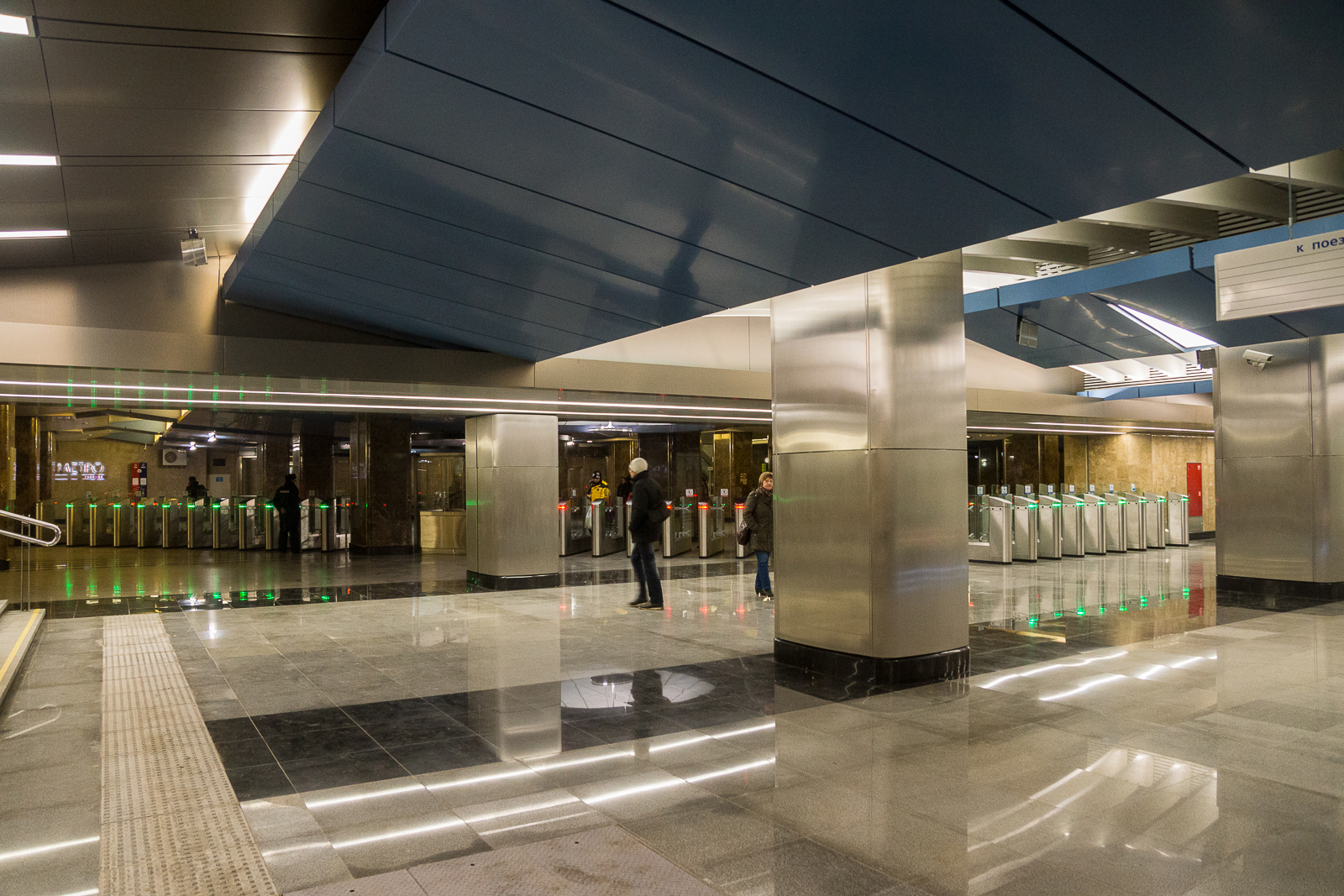 Фотографии из отчёта о первом дне работы станции